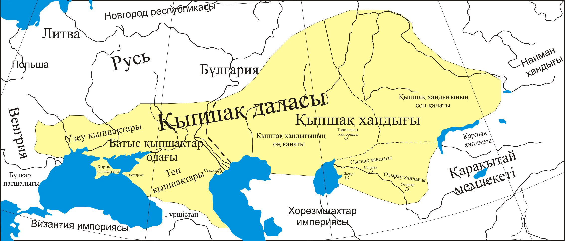 Расселение половцев (кипчаков), конец XI - начало XII вв